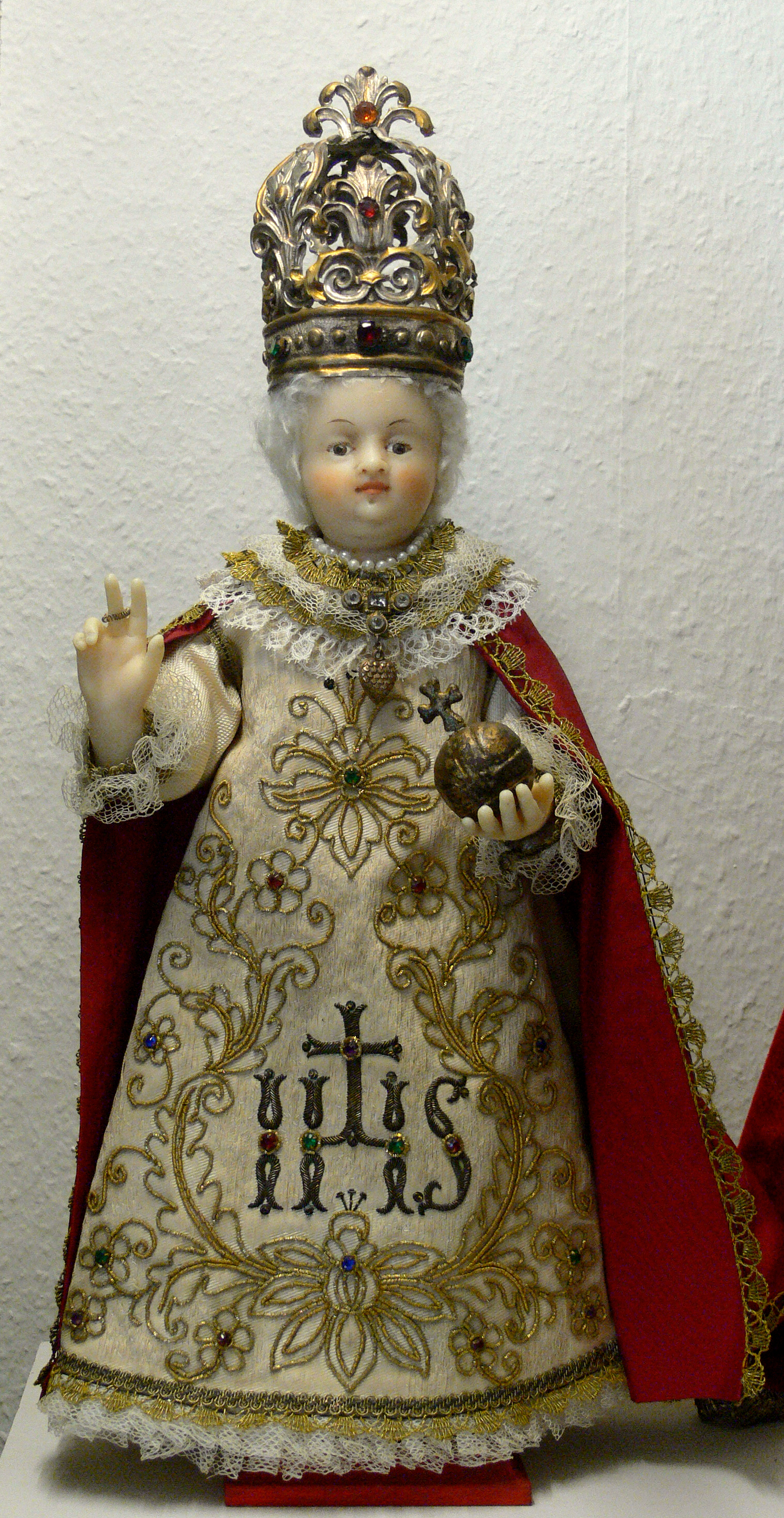 Weingarten, Museum für Klosterkultur Prager Jesulein, Oberschwaben, um 1870 (restauriert)